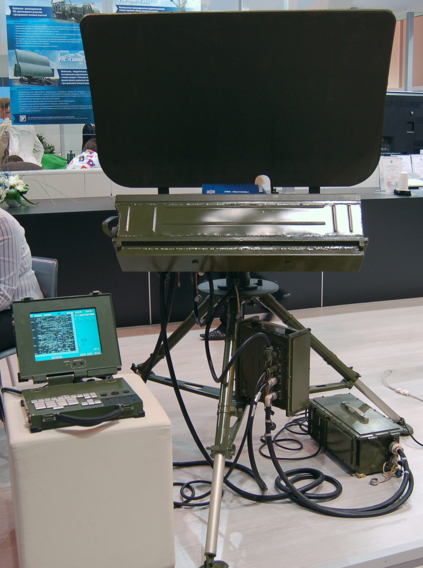 РЛС "Аистёнок" на МАКС-2009